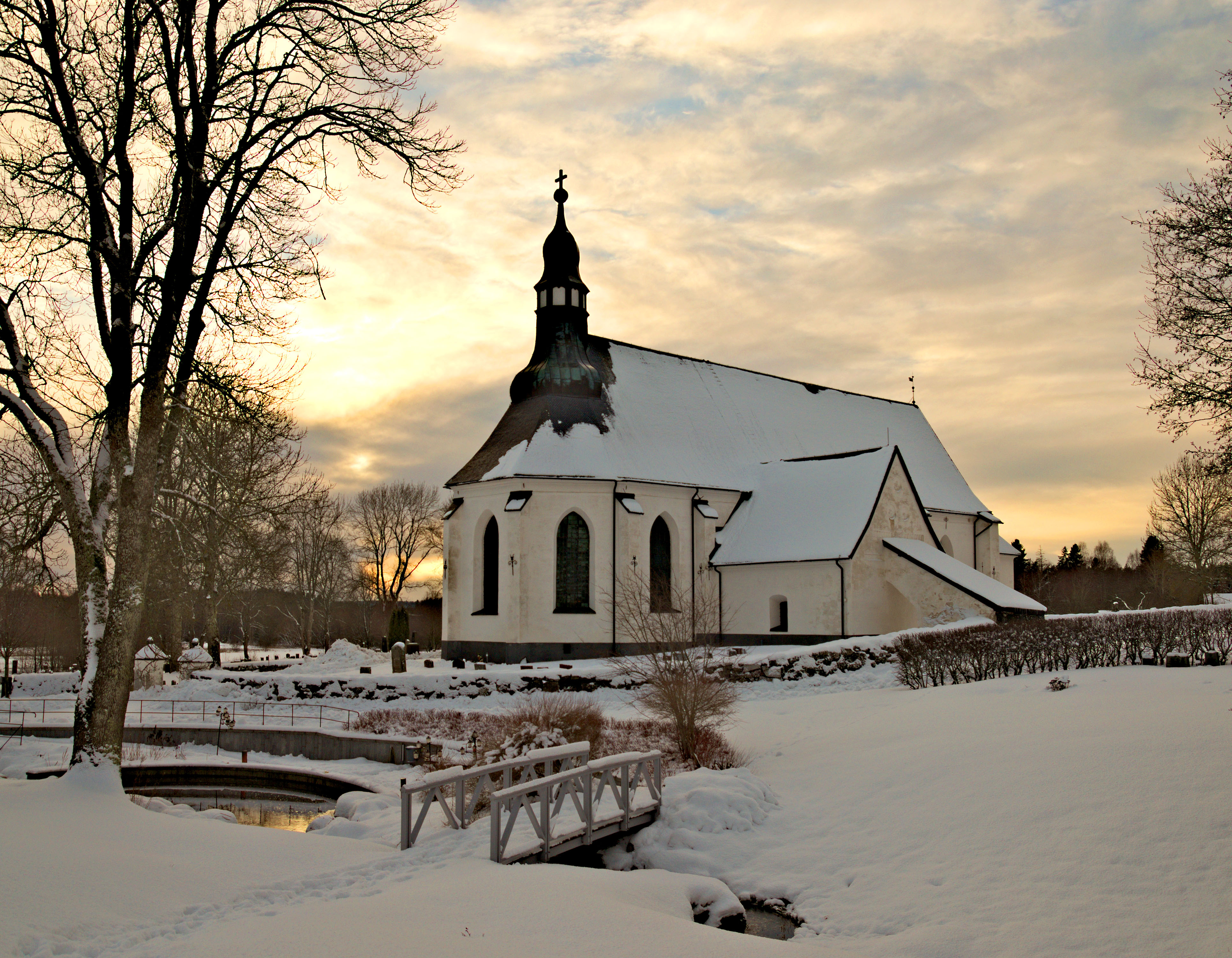 Österåkers kyrka.